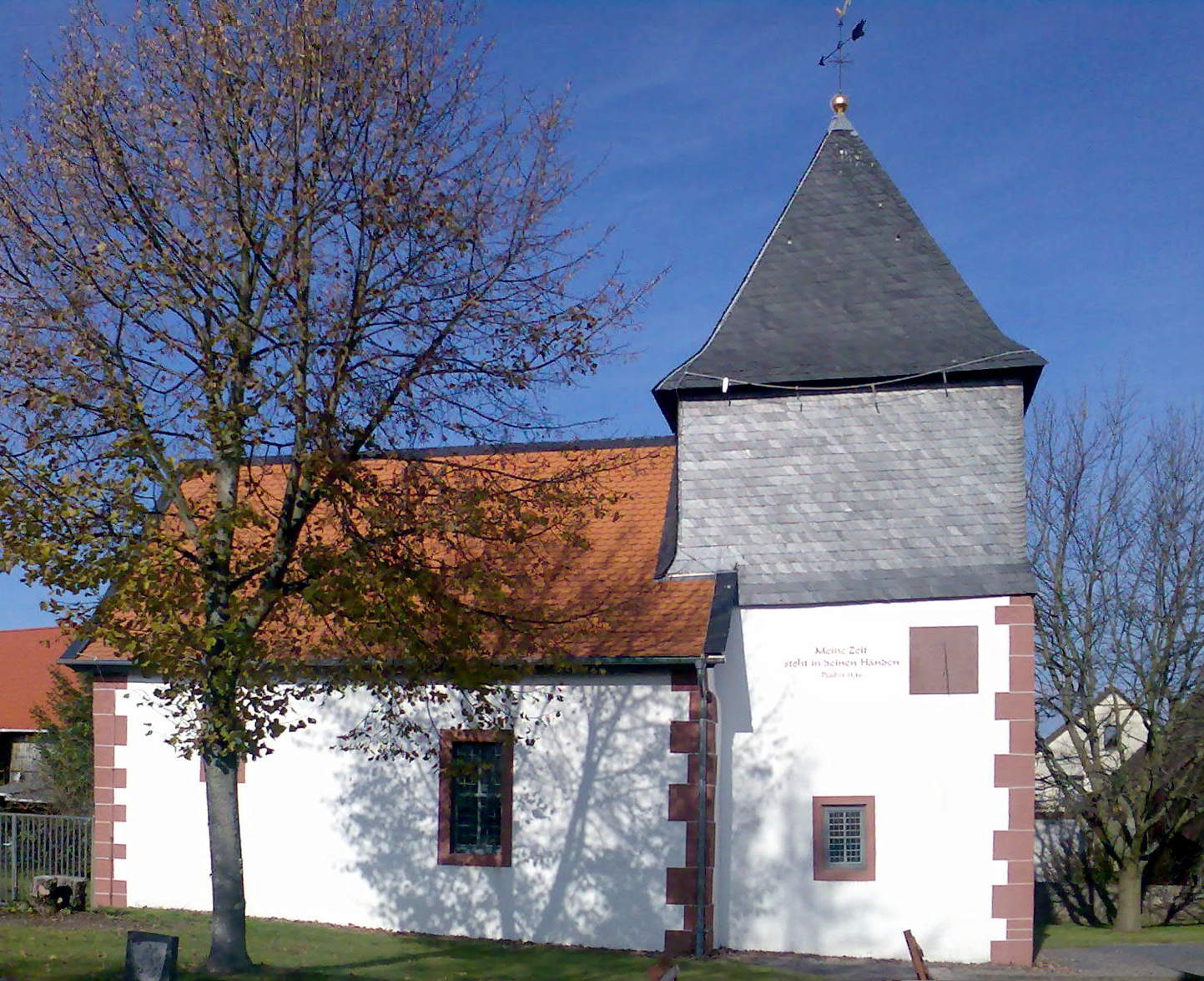 Evangelische Kirche in Bullau, einem Stadtteil von Erbach (Odenwald) in Hessen, Deutschland.